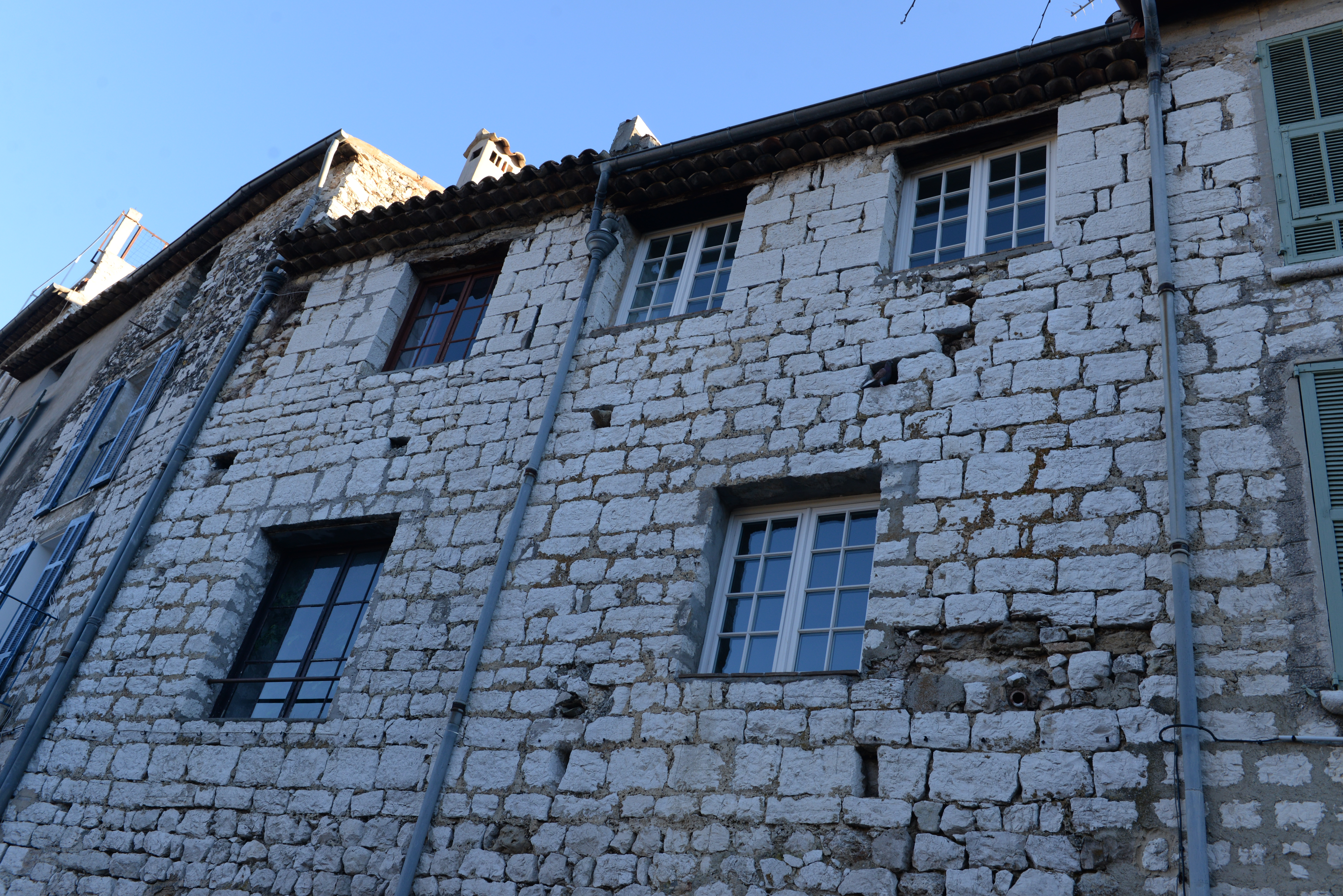 Remparts de Vence (Alpes-Maritimes)